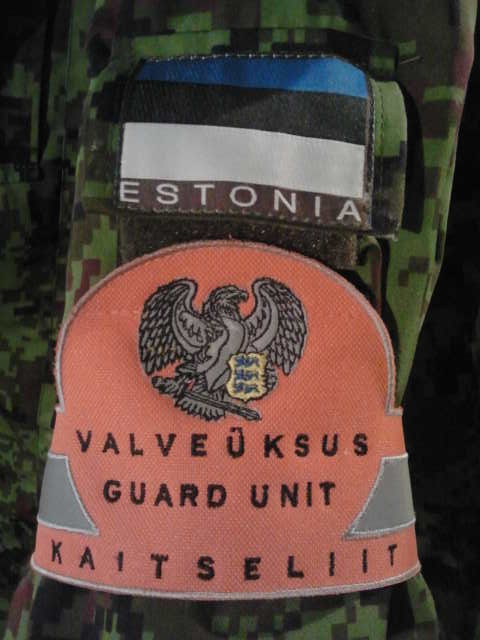 Valvekompanii käelint